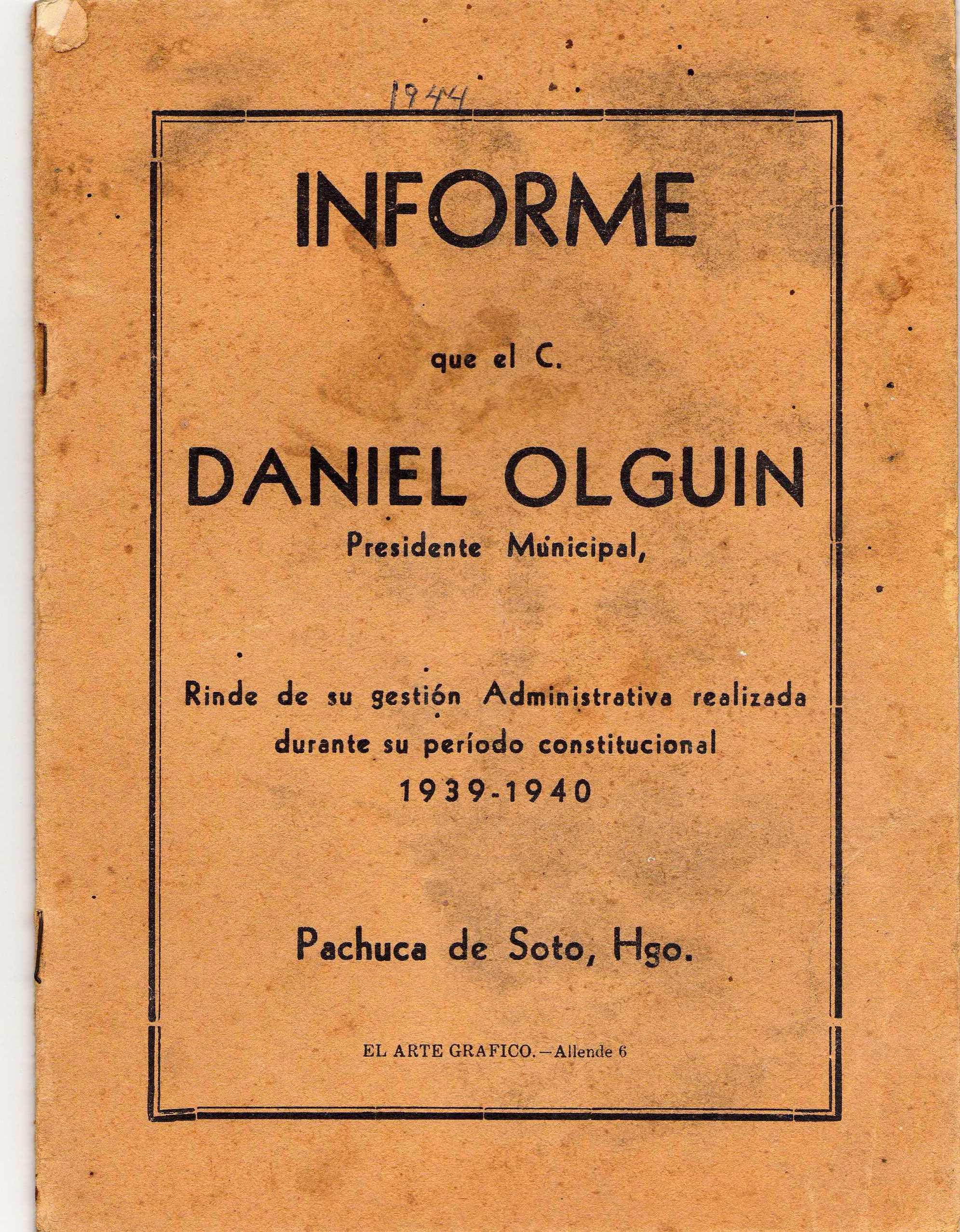 Portada del Primer Informe de Daniel Olguin Diaz, Presidente Municipal de Pachuca de Soto, Hidalgo. 1939 - 1940